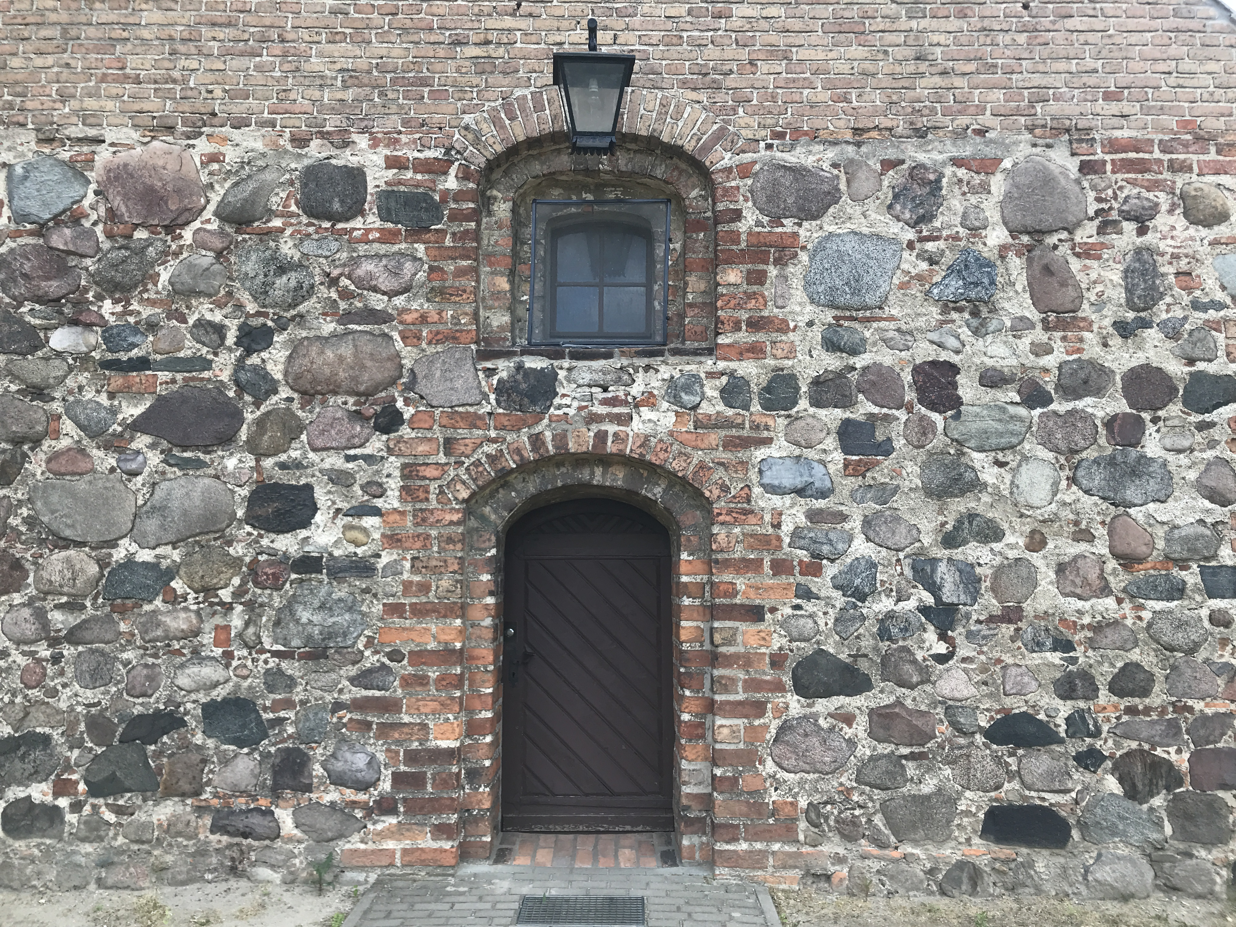 St.-Annen-Kapelle in Trebbin, Landkreis Teltow-Fläming in Brandenburg